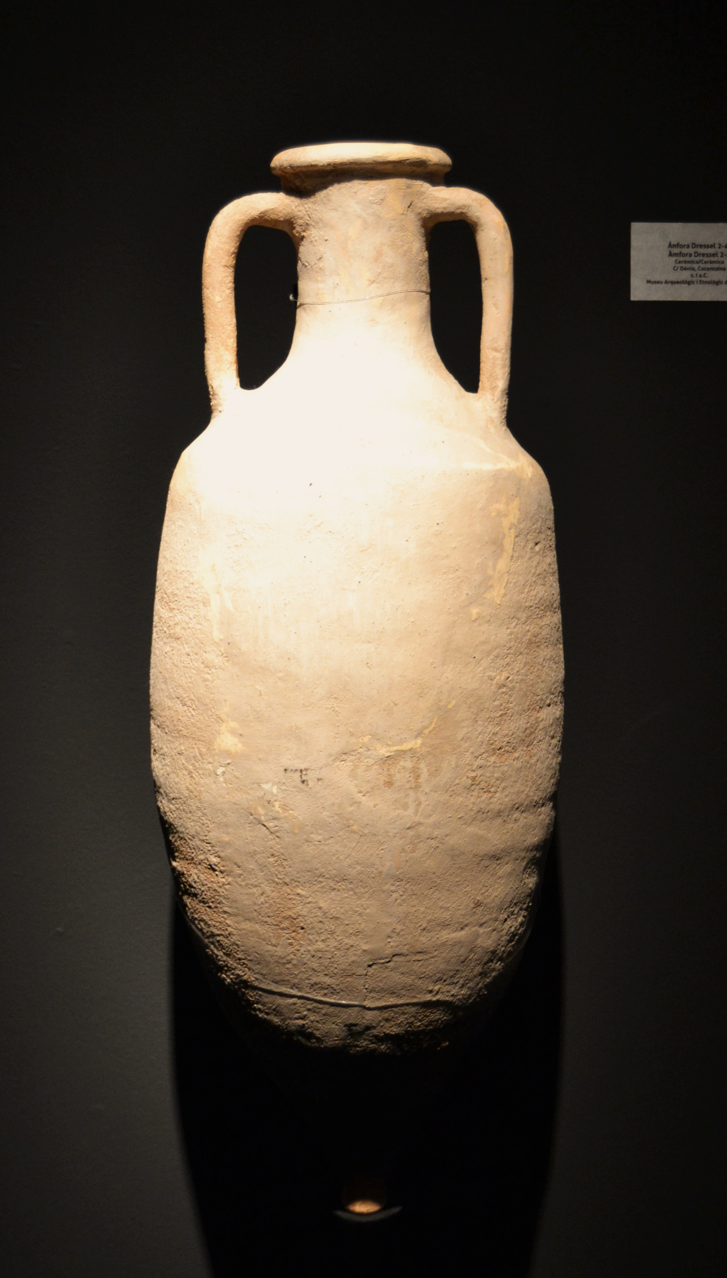 Àmfora Dressel 2-4, segle I aC. Carrer de Dénia de Cocentaina. Museu arqueològic i etnològic del Comtat